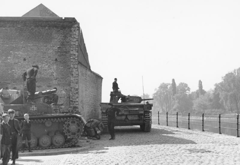 Maastricht. Deutsche Panzerkampfwagen als Sicherung an der Maas. 10. 5. 1940 vorm.